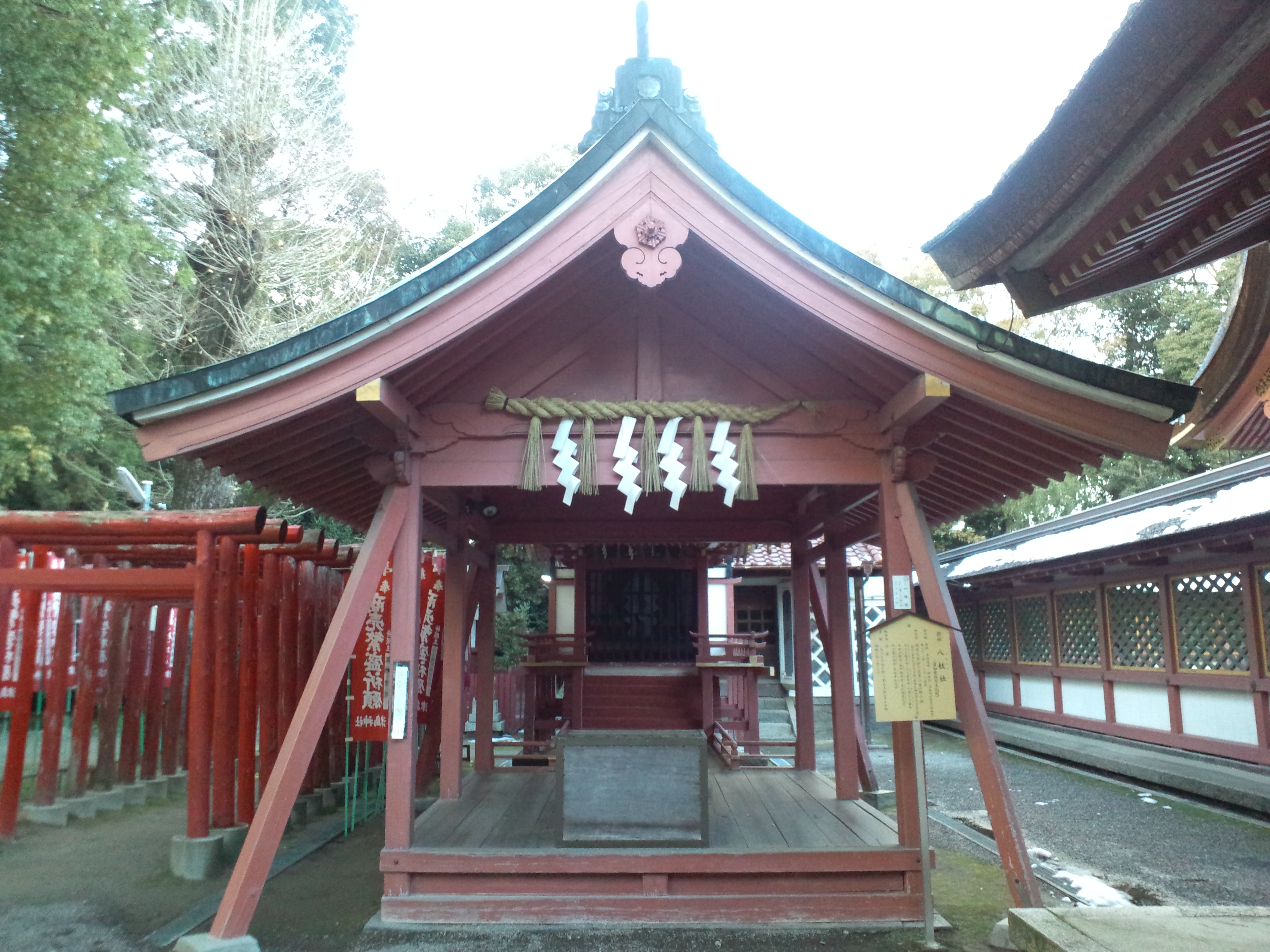 津島神社 八柱社